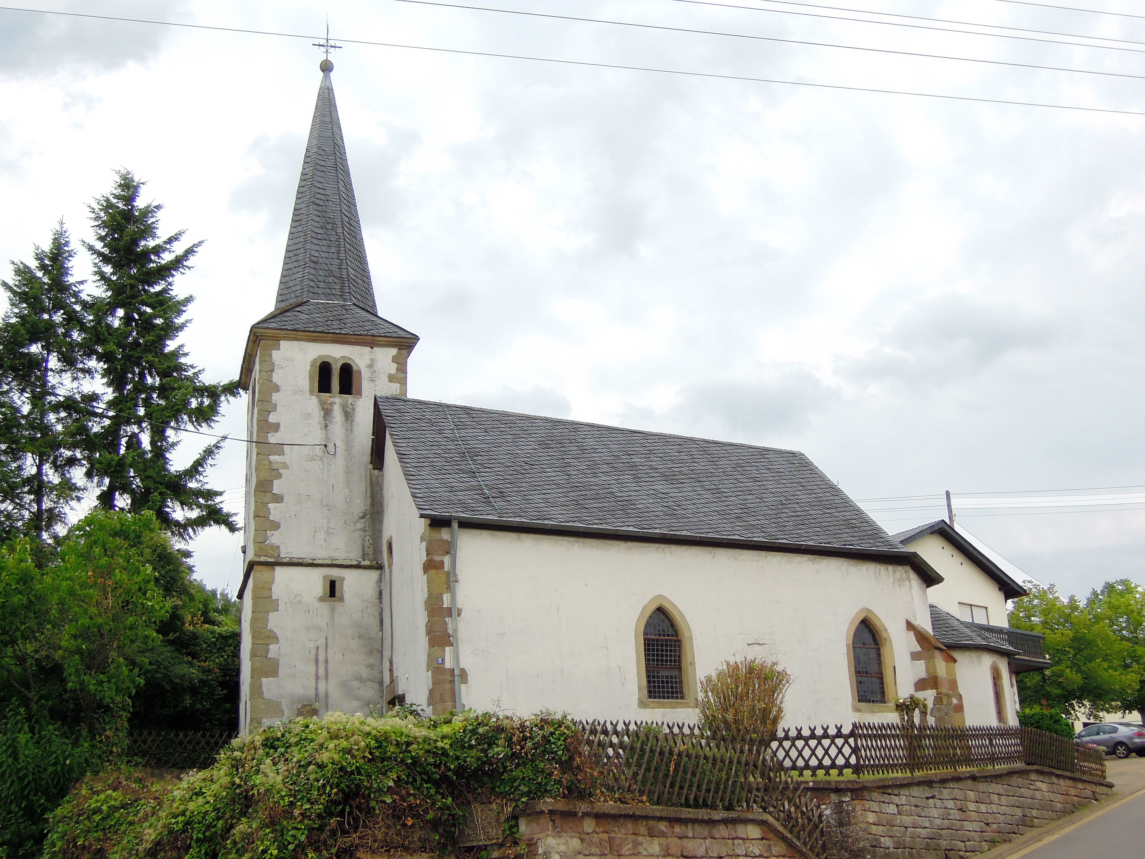 Wendelinusstraße, kath. Kapelle St. Barbara (Einzeldenkmal)